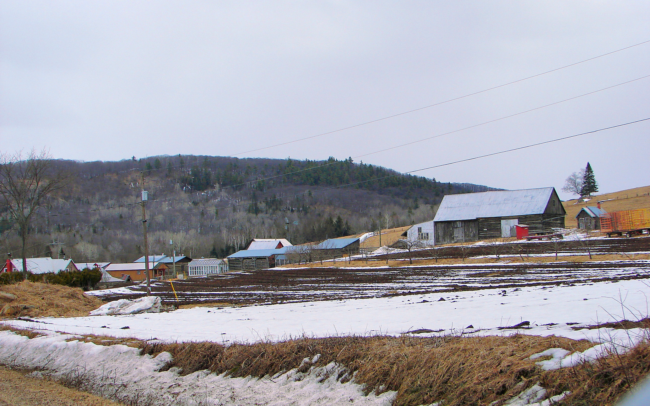 Craigmont, Ontario, Canada